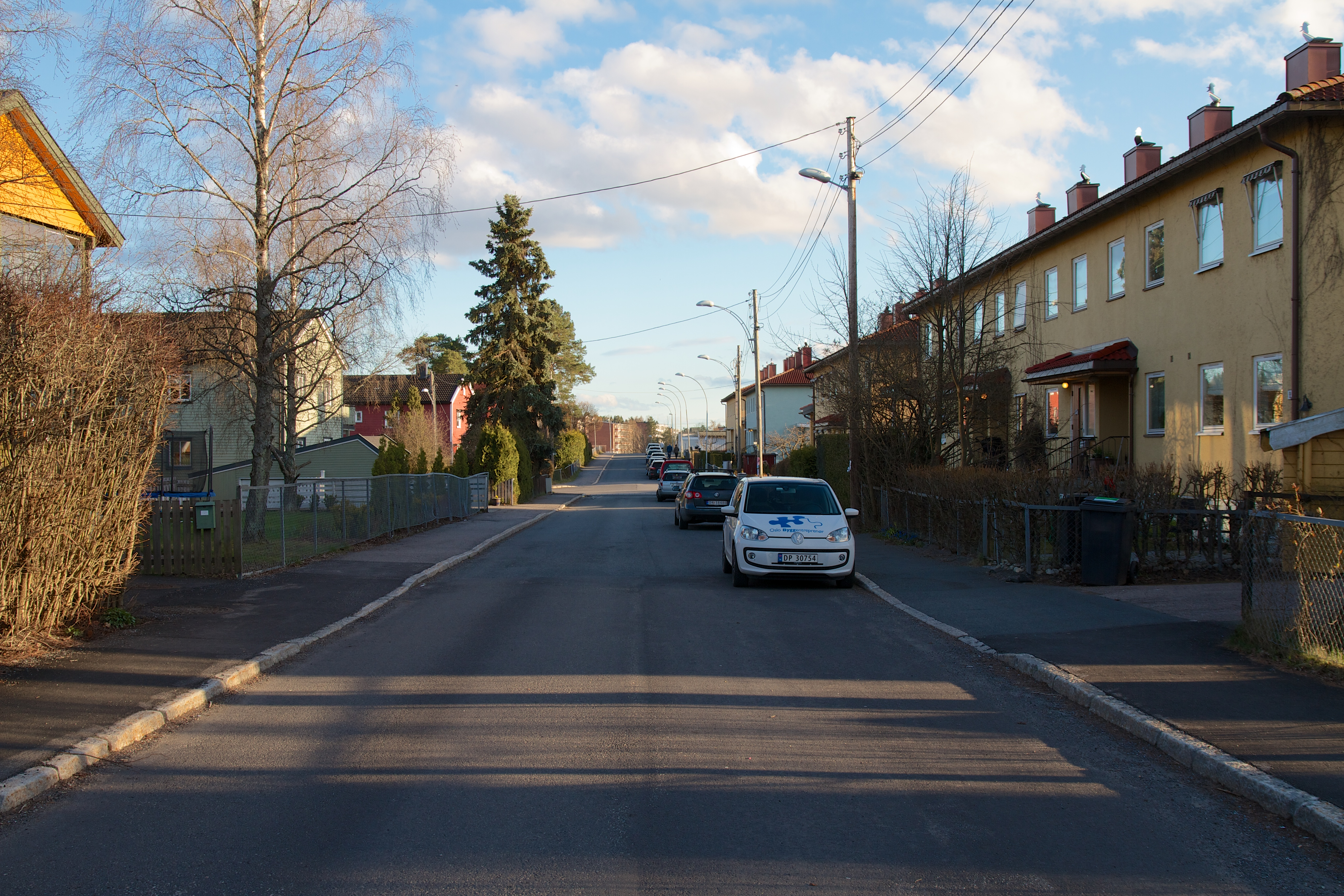 Guristuveien på Bøler i Oslo.